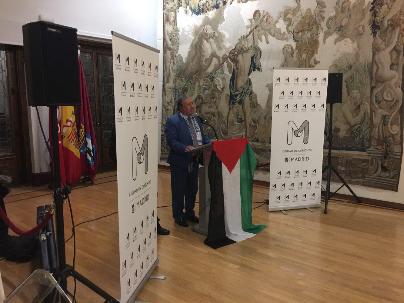 En el Salón de Tapices de la Casa Cisneros, bajo la presidencia de Mauricio Valiente, Tercer Teniente de Alcalde, se ha celebrado el acto institucional del Ayuntamiento de Madrid en conmemoración del Día Internacional de Solidaridad con Palestina. En el acto, que ha contado con la participación del Embajador de Palestina en España, Musa Amer Odeh, han intervenido representantes del movimiento de solidaridad con Palestina y la profesora Luz Gómez García, quien es además Premio Nacional de Traducción por la obra del poeta palestino Mahmud Darwish.